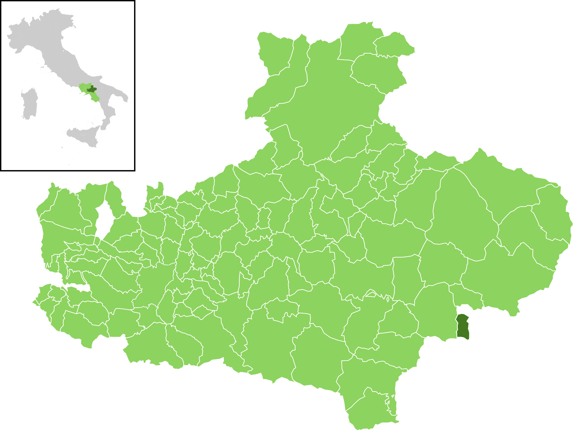 Posizione del comune all'interno della provincia di Avellino